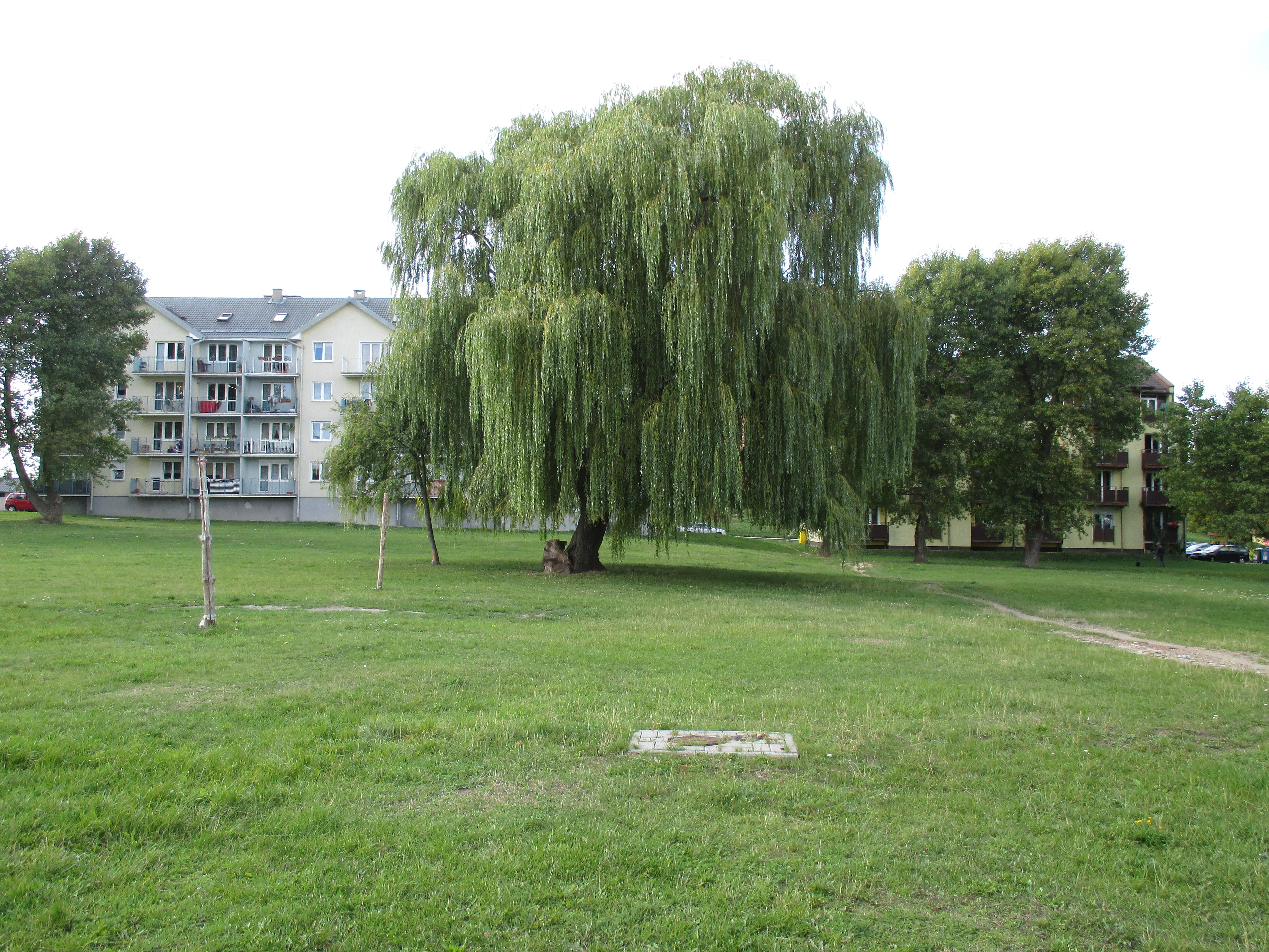 Osiedle Bajkowe w Tczewie